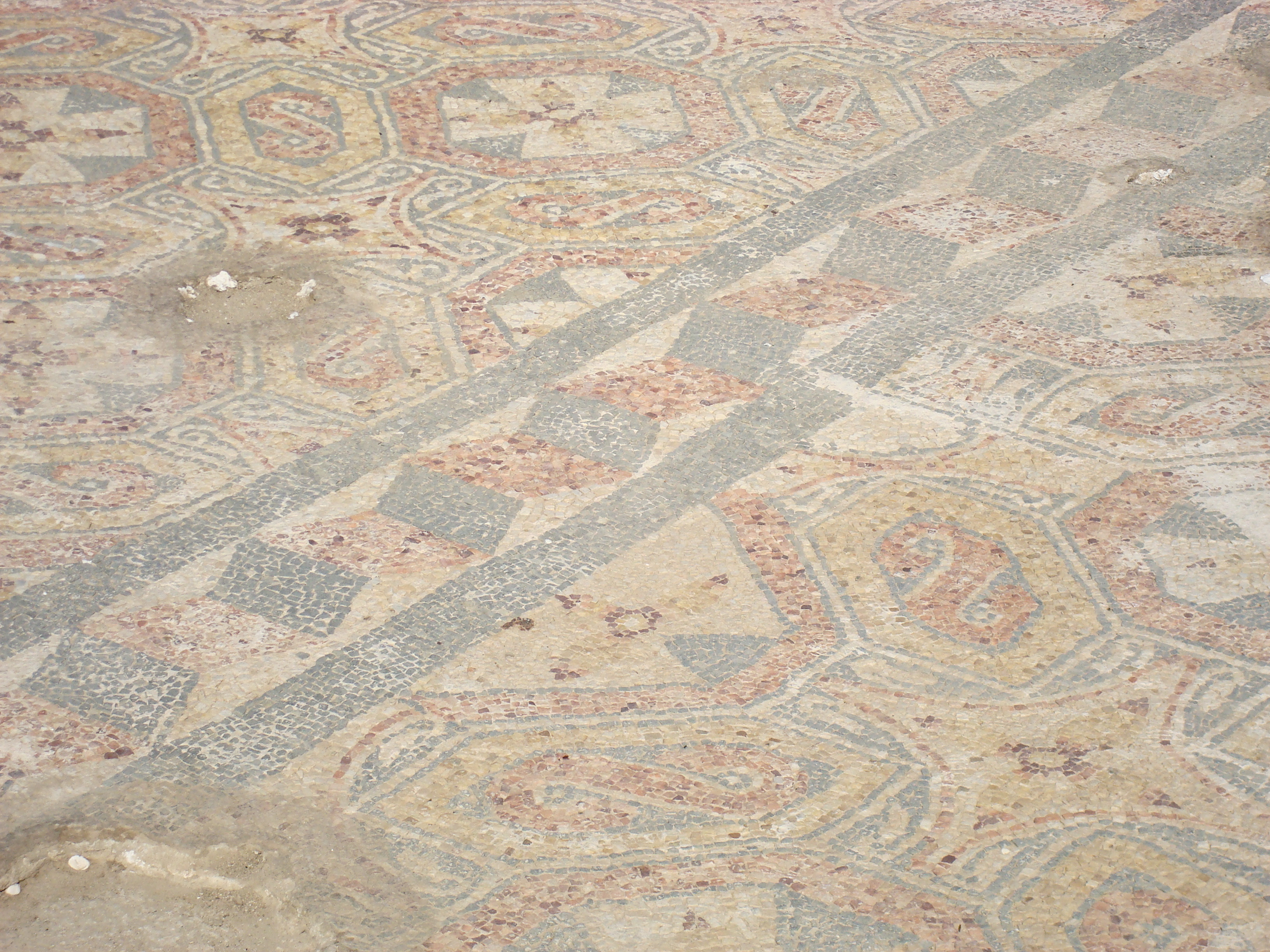 Opus tesellae en Villa de Saucedo, Talavera de la Reina (Spain)